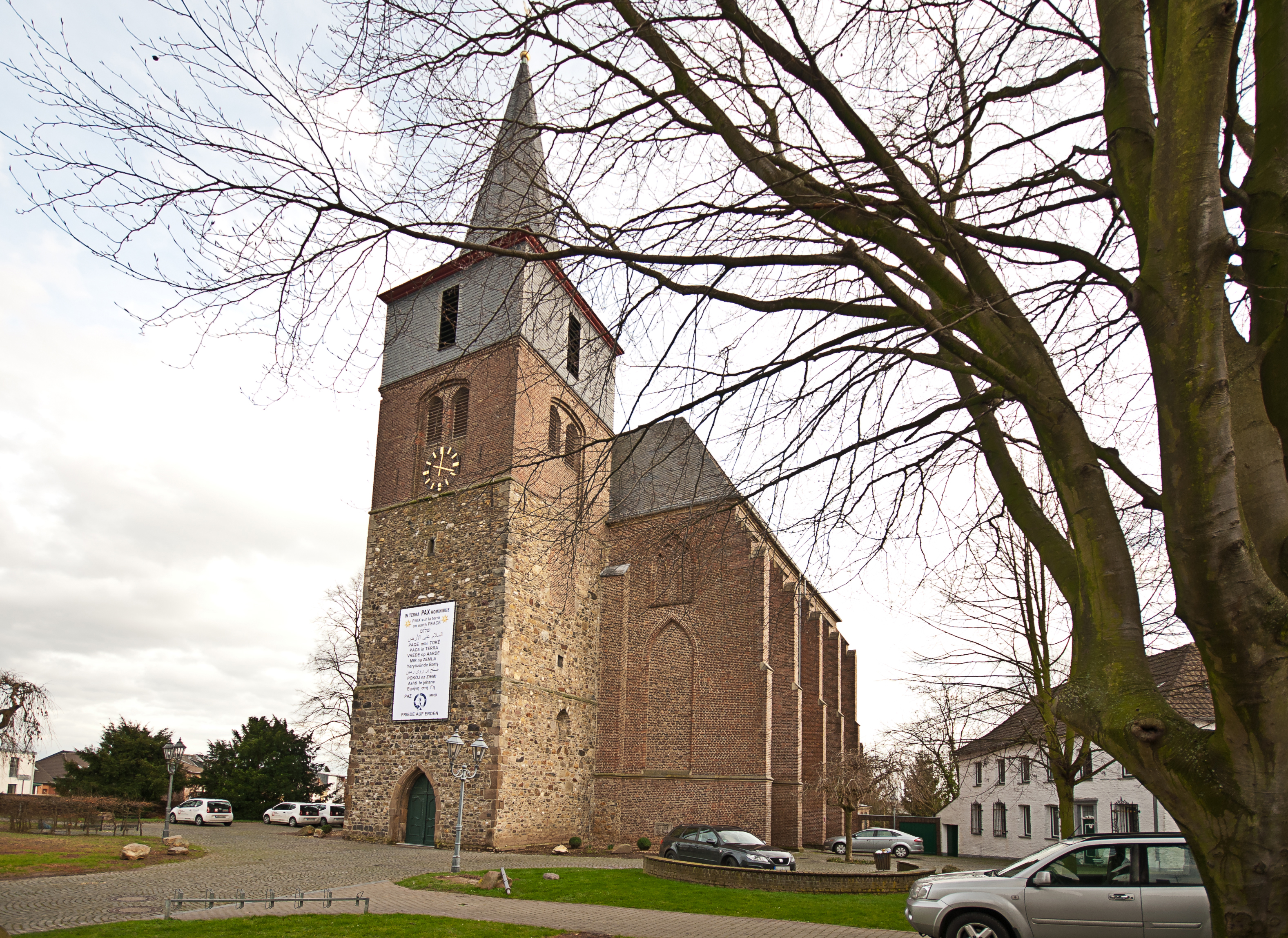 Ansicht der katholischen Kirche St. Martinus in Linnich